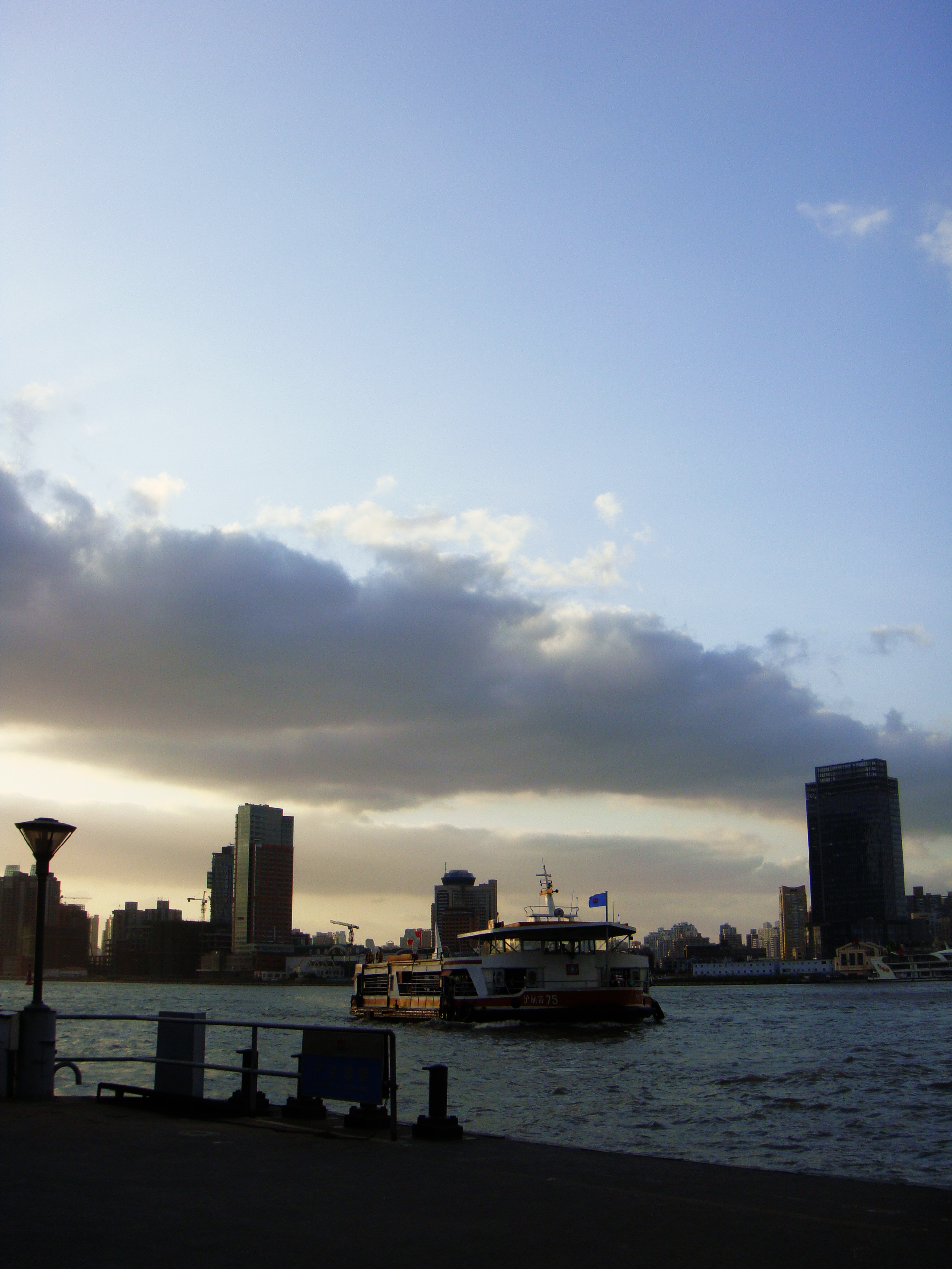 正在驶入其昌栈轮渡站的轮渡